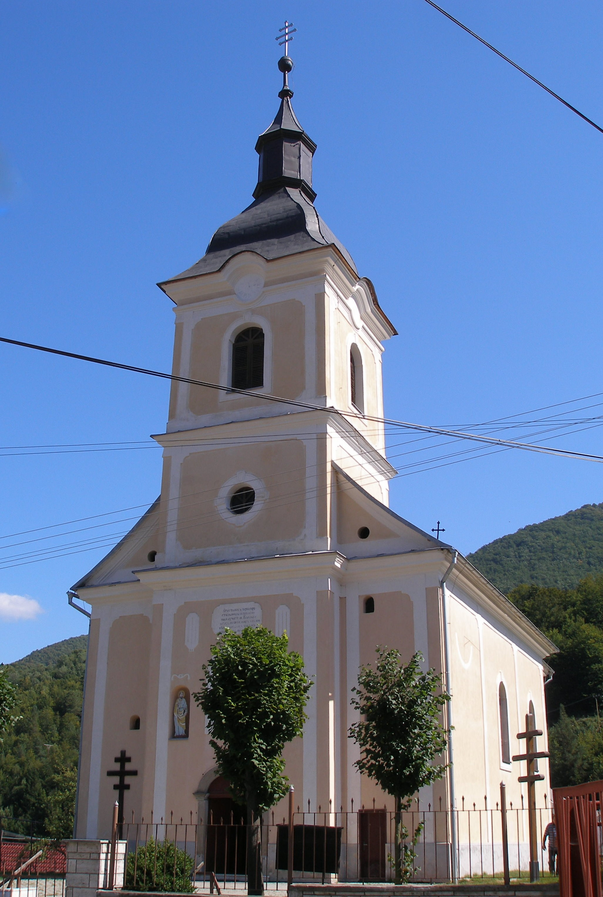 Spišská obec Košov. Okres Gelnica.